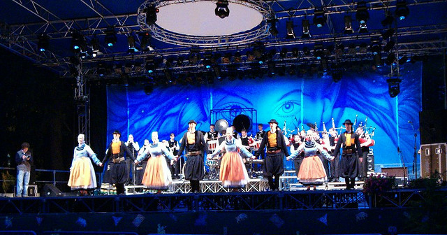 Bagad Cap Caval (Brittany) at festival Celtica 2005